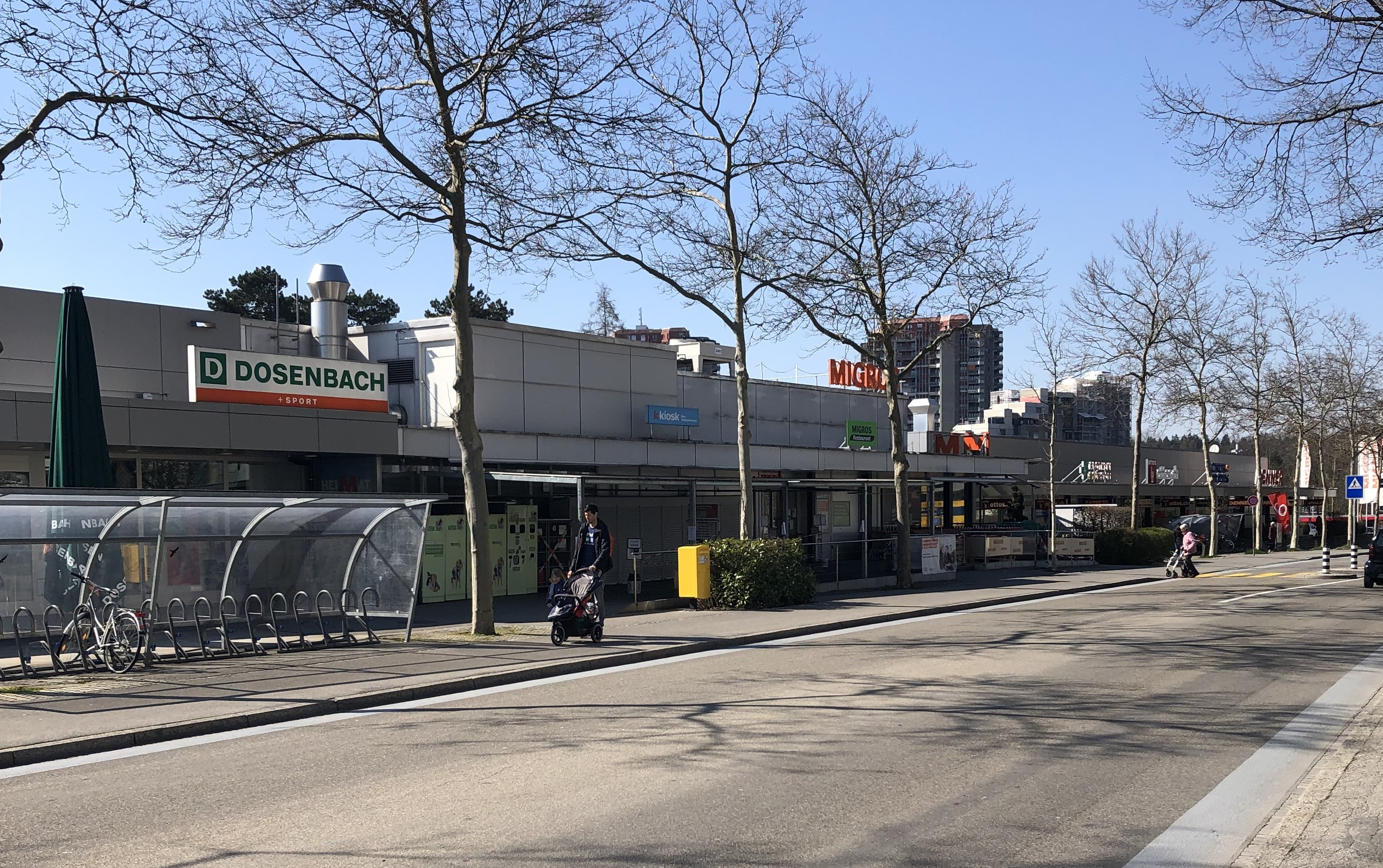 Tscharnergut Einkaufszentrum